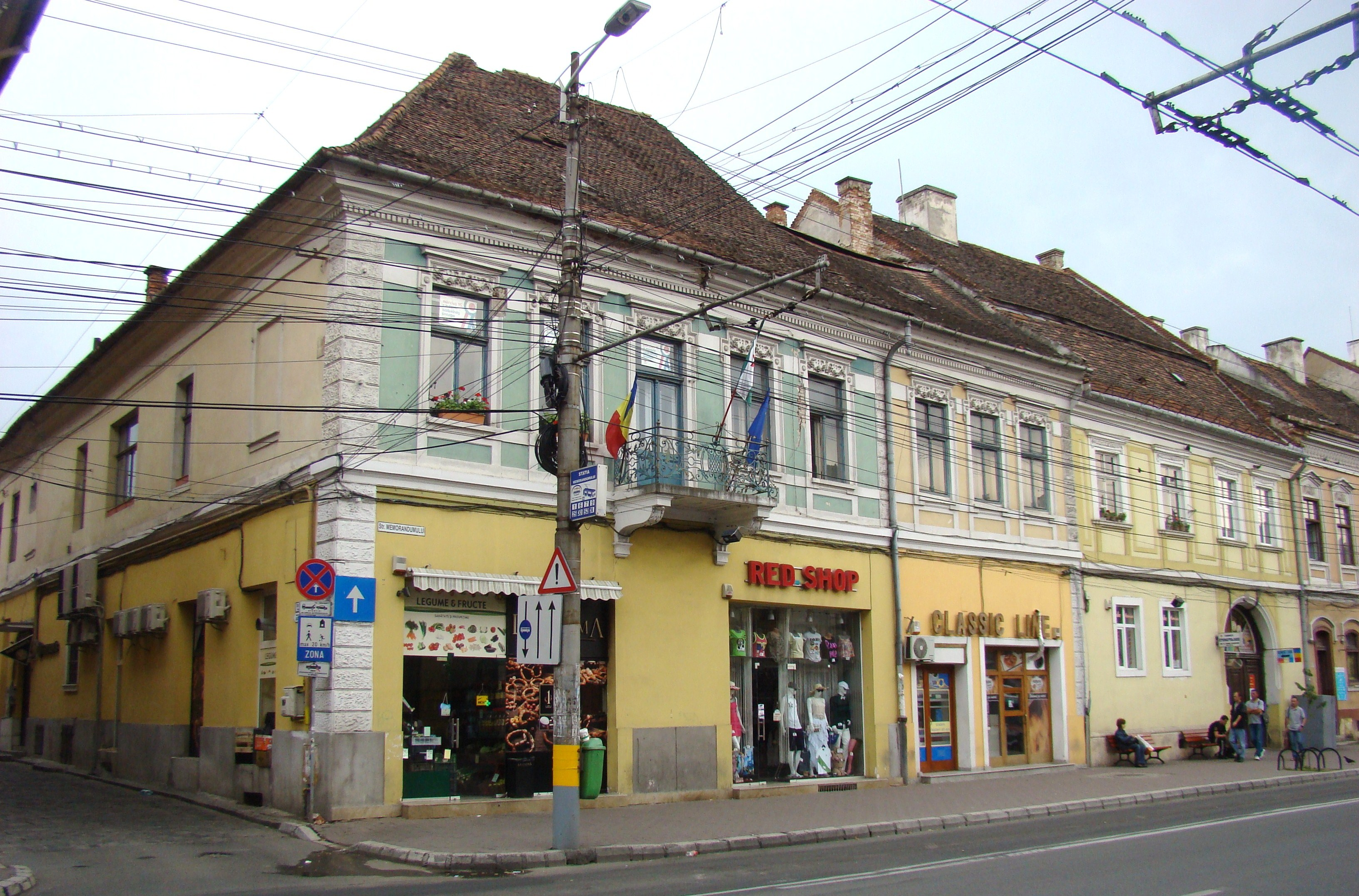 Clădire monument istoric, str. Memorandumului, nr. 11-13